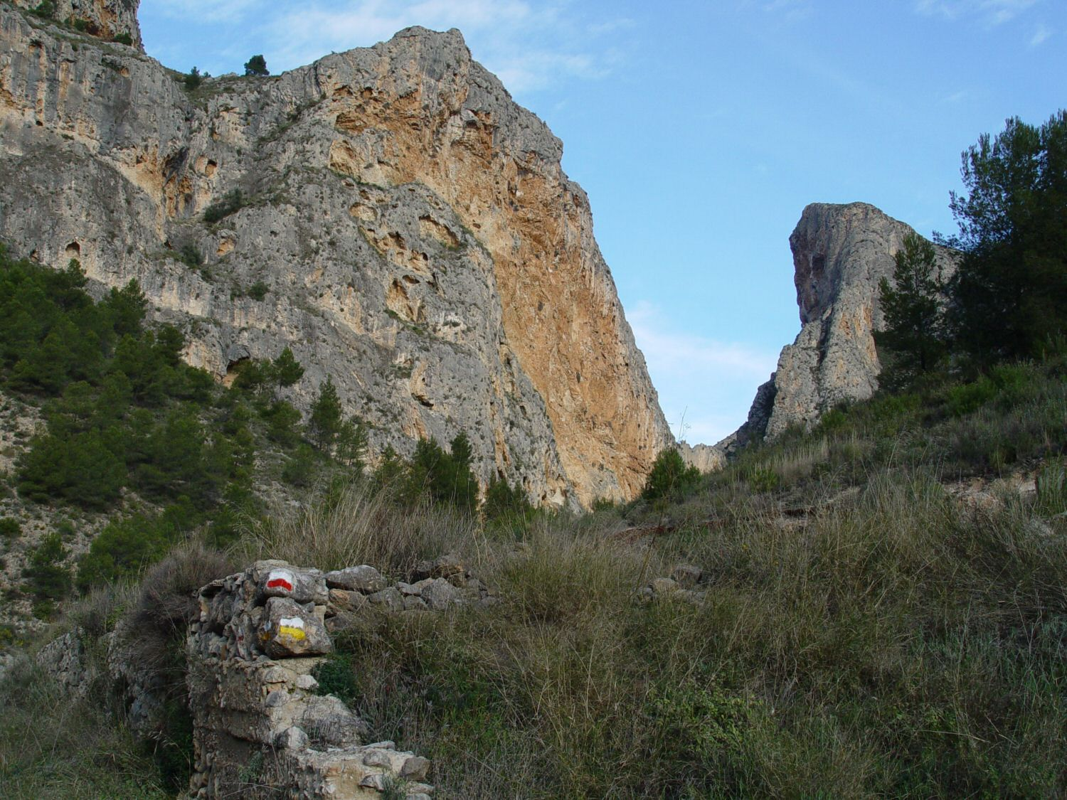 Barranc del Sinc - Alcoi